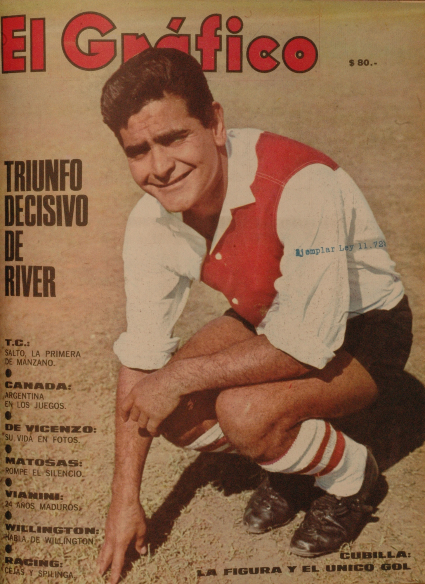 El Grafico del 01 de Agosto de 1967. Edicion 2495